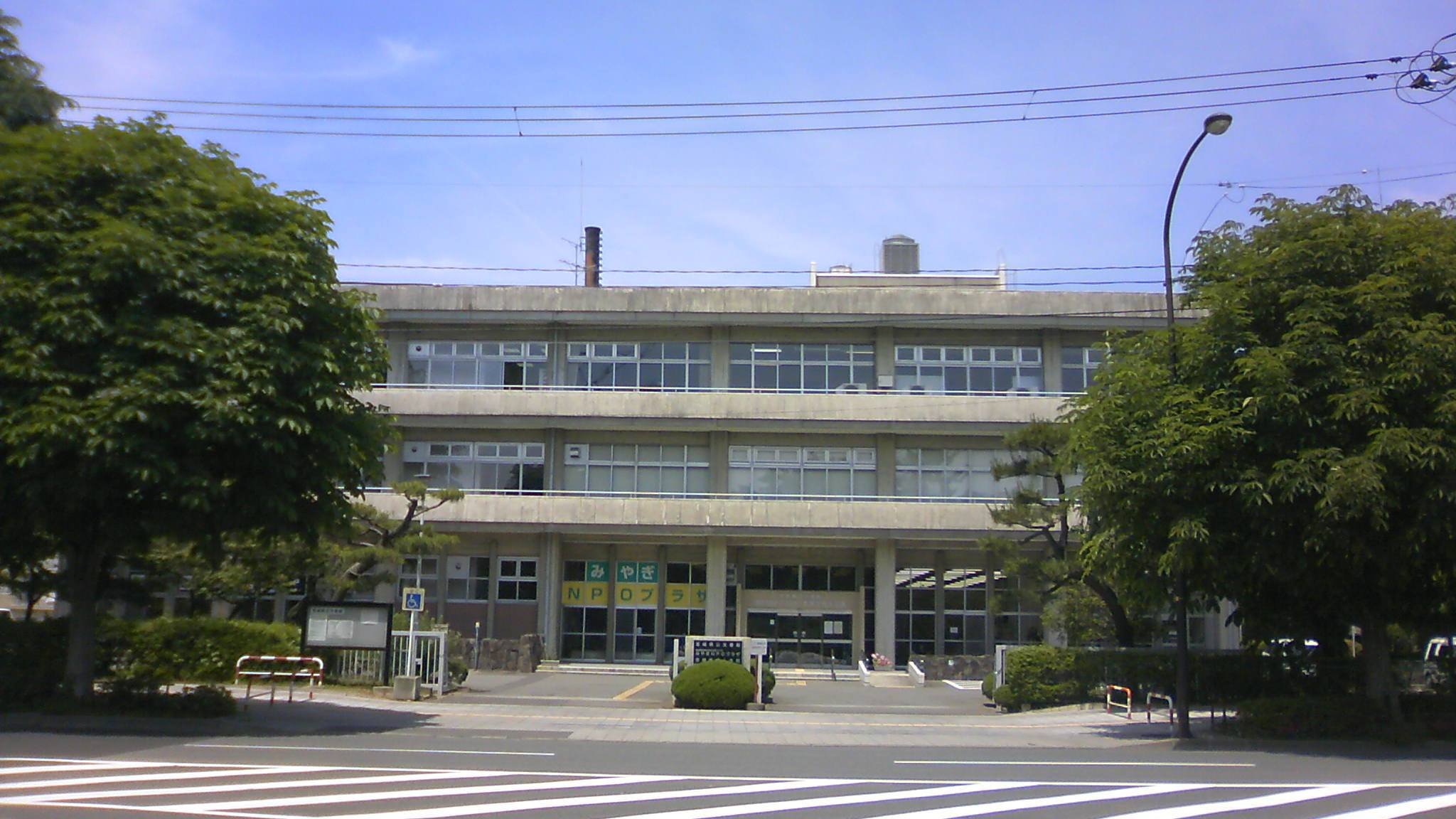 宮城県公文書館